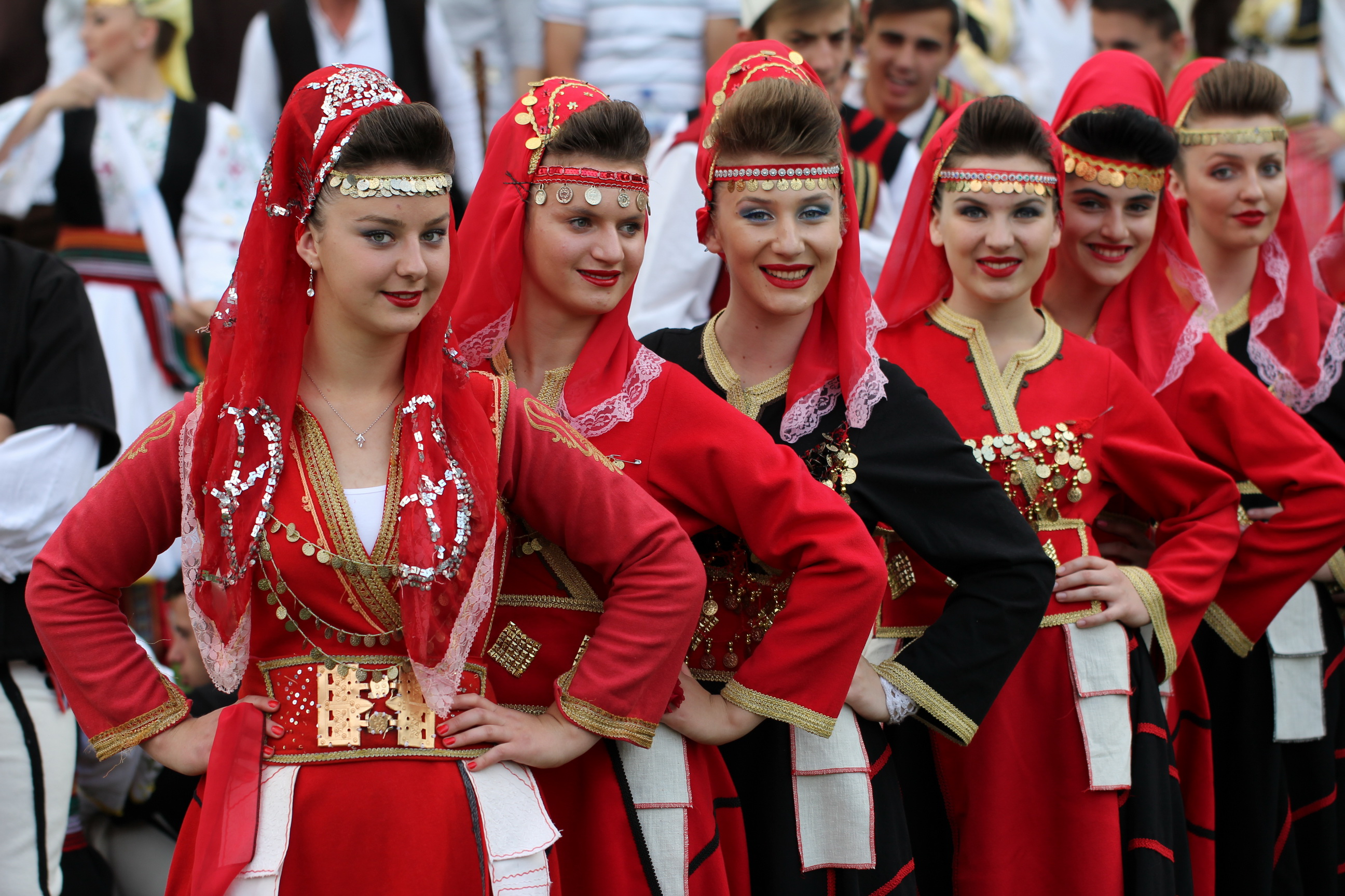 Sofra Dardane - Bajram Curr